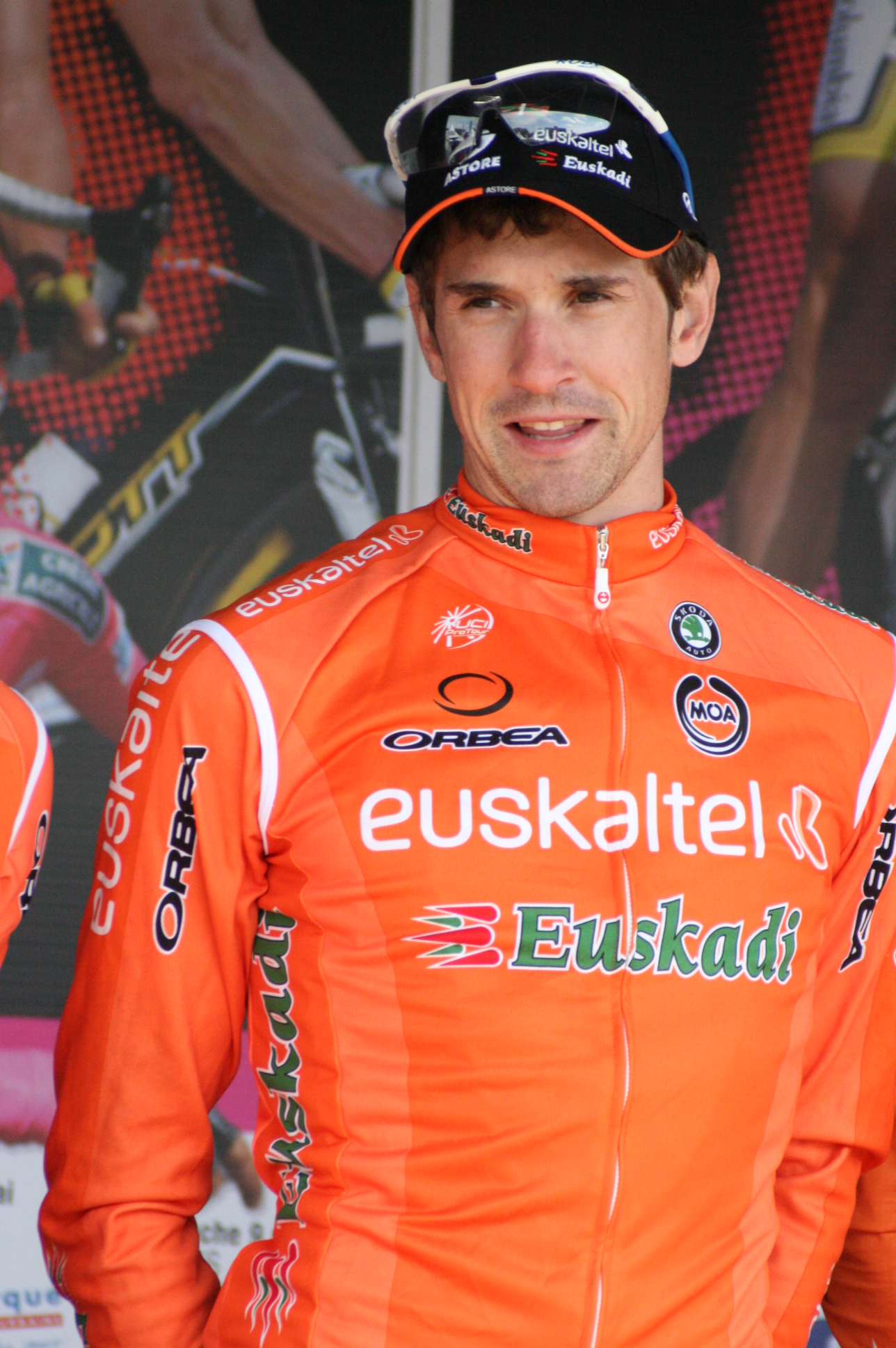 Aitor Hernandez lors de la présentation des équipes des 4 jours de Dunkerque